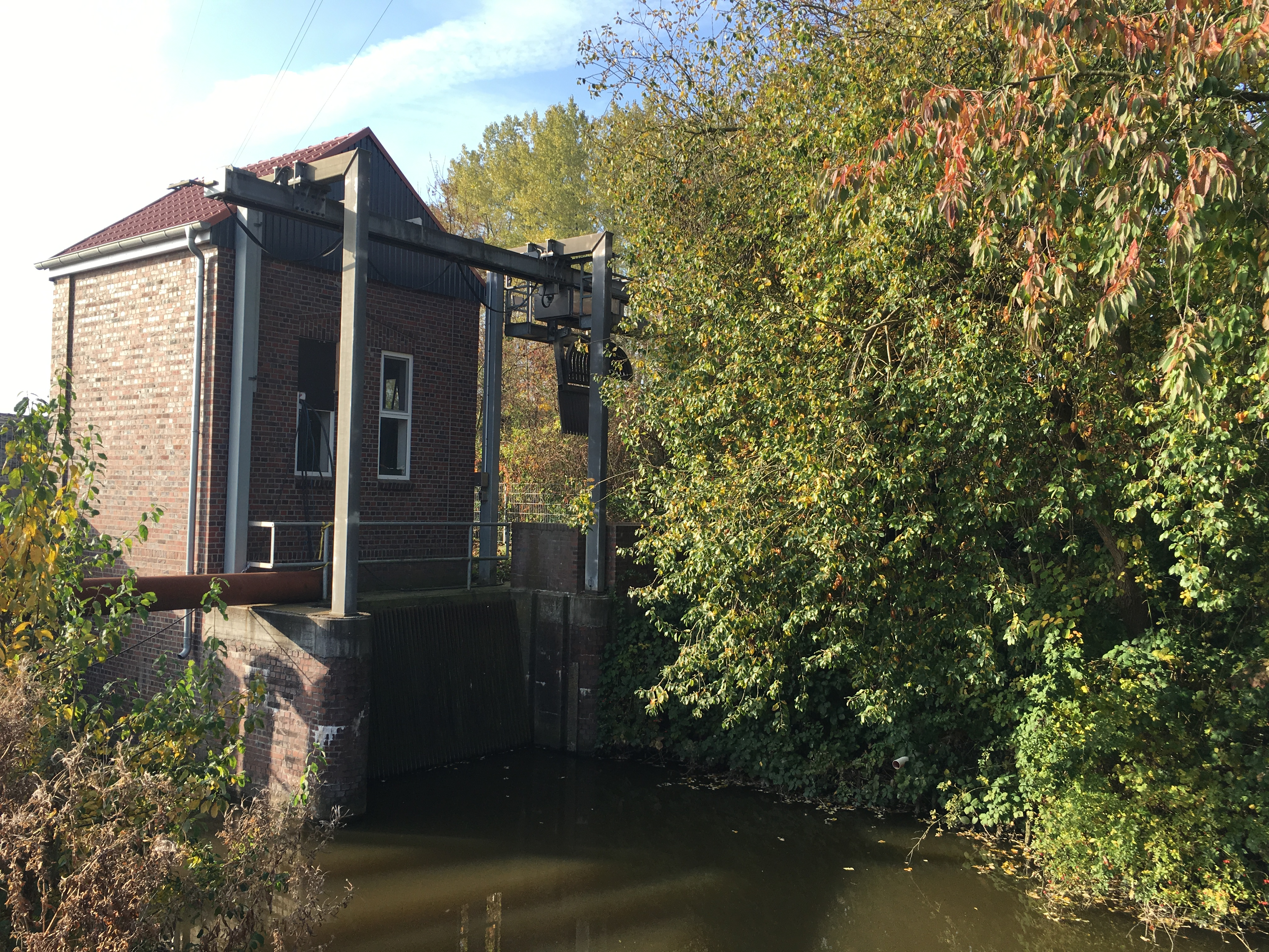 Schöppwark an dat Achthöbener Fleet in Achthöbener Diek (bi Oosten) bi de Münn in de Oost